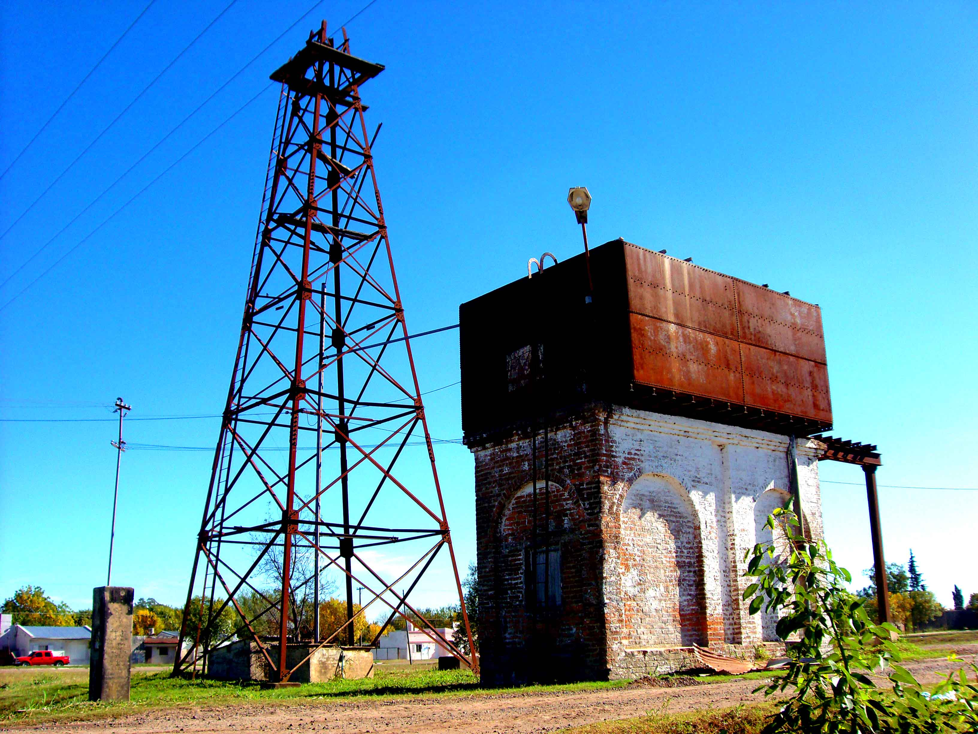 Antiguo Tanque del Ferrocarril